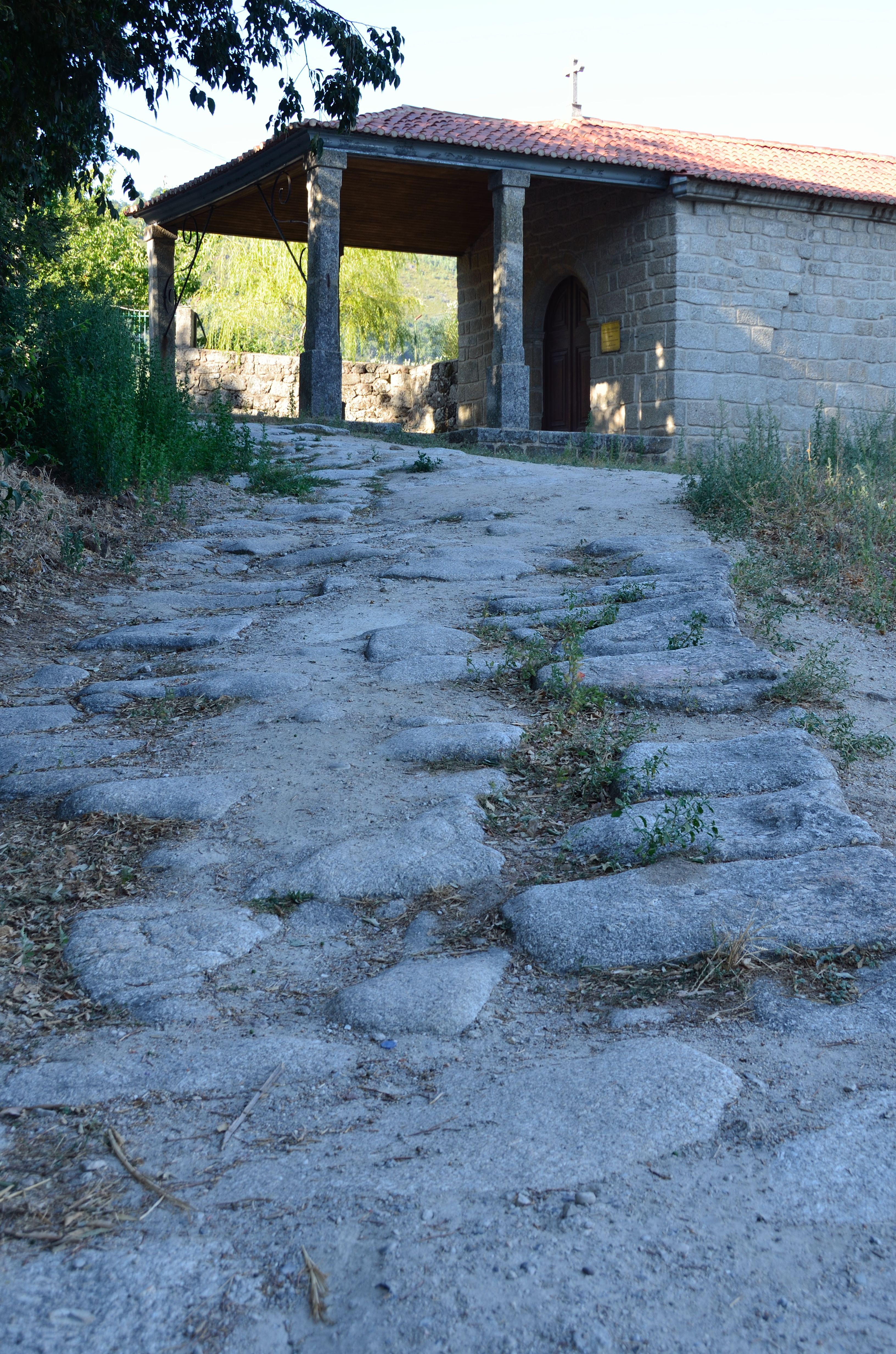 Estrada romana